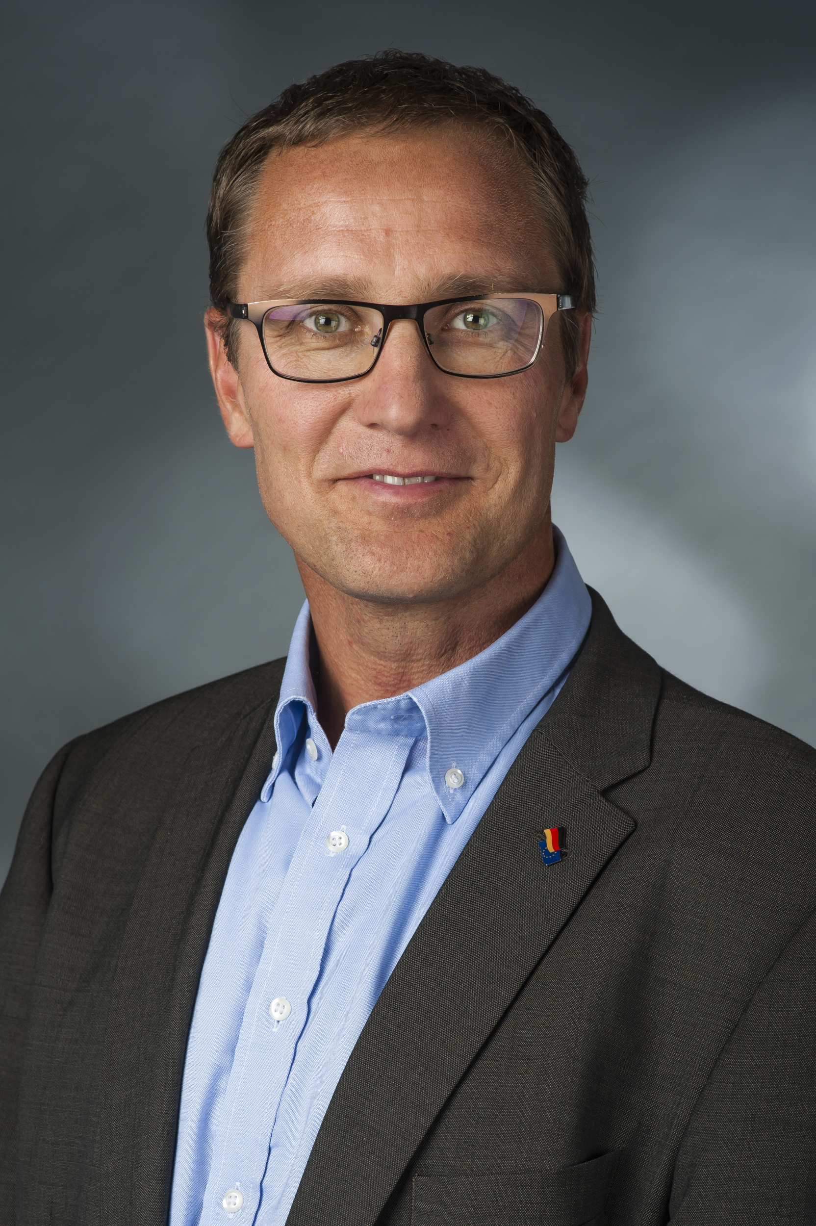 Roy Kühne (* 27. September 1967 in Magdeburg) ist ein deutscher Politiker (CDU) und seit 2013 Mitglied des Deutschen Bundestages.